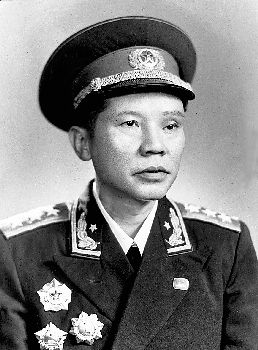 朱良才，中华人民共和国中国人民解放军将领、上将。